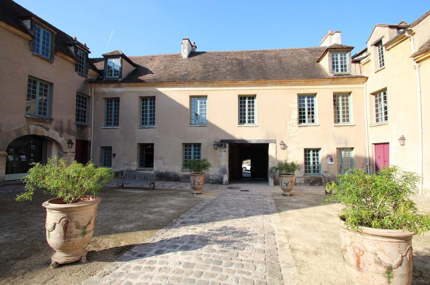 La cour du musée